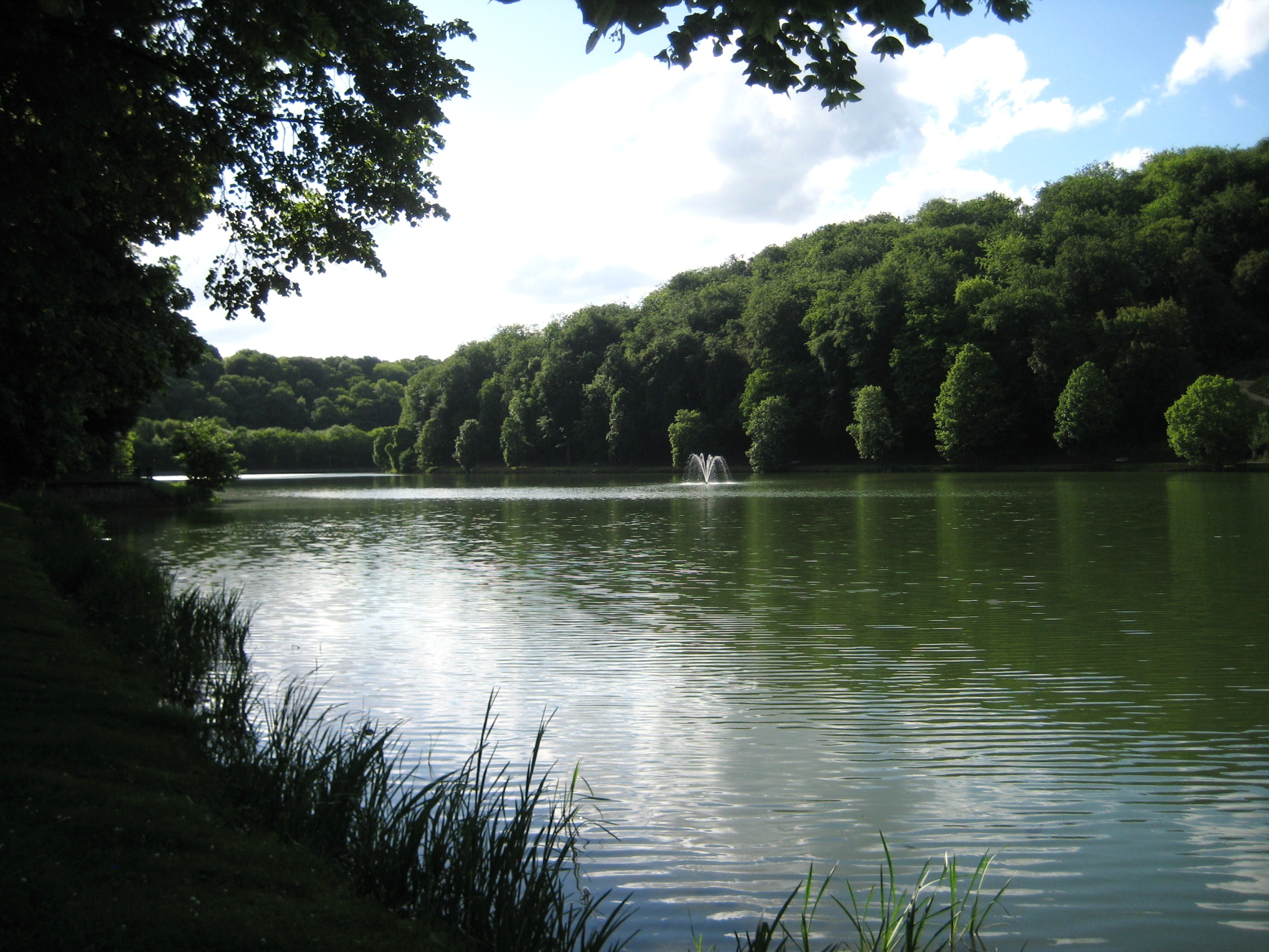 Description Le plan d'eau de la Sangsue Date18 May 2009Sourcemon appareil photoAuthorAimelaime Le plan d'eau de la Sangsue